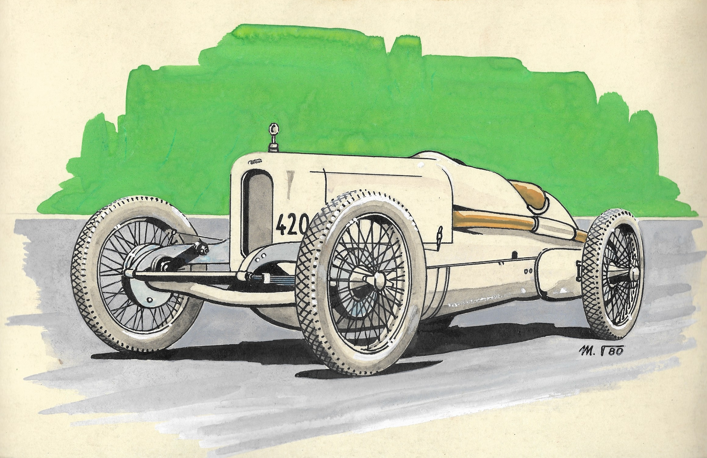 Walter 0 závodní (1924) kresba Milan Tošnar